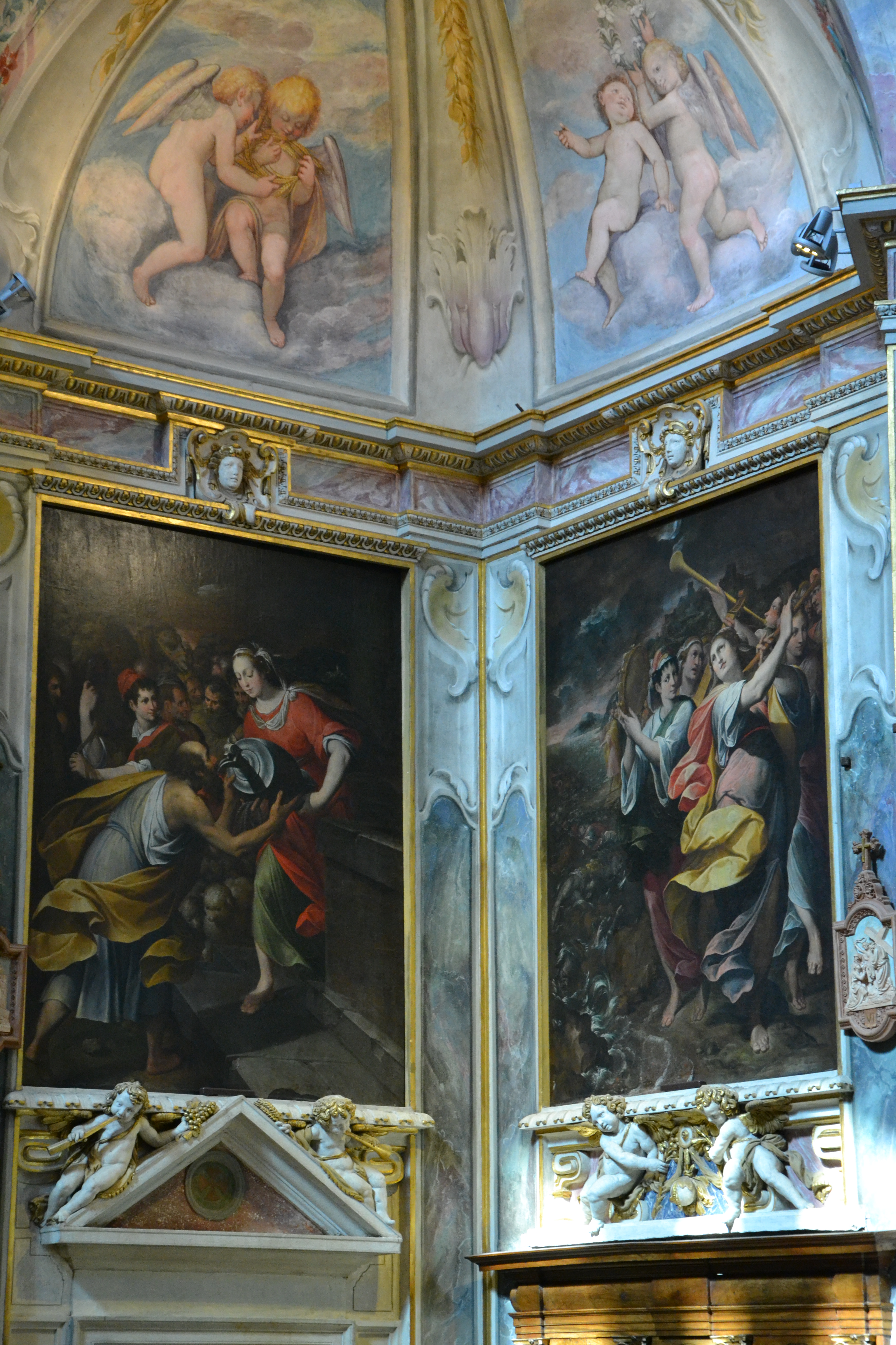 Santa Maria di Canepanova (Pavia) - sec. XVII, Camillo Procaccini, Rebecca e Miriam